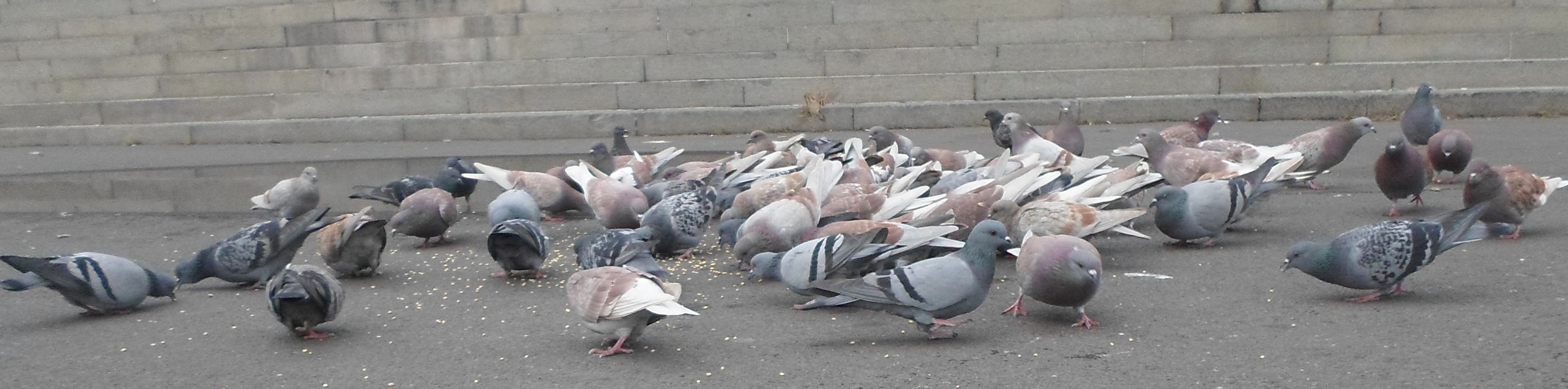 Голуби на площади Свободы в Ереване.